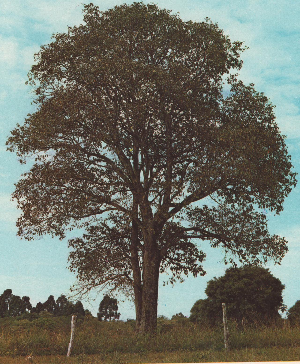 Ejemplar de Luehea divaricata, en Argentina.